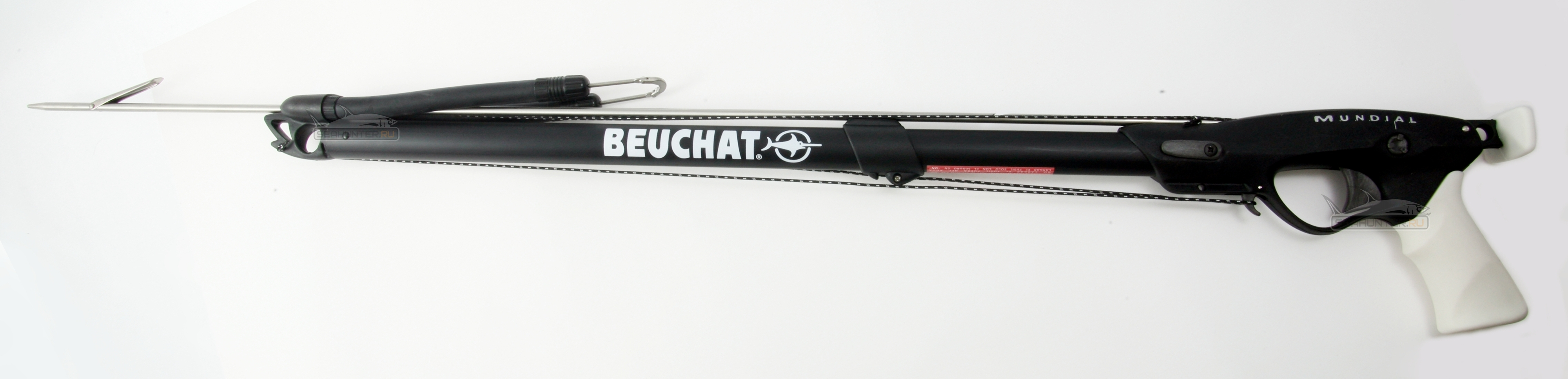 Подводный арбалет компании Beuchat модель Mundial Competition